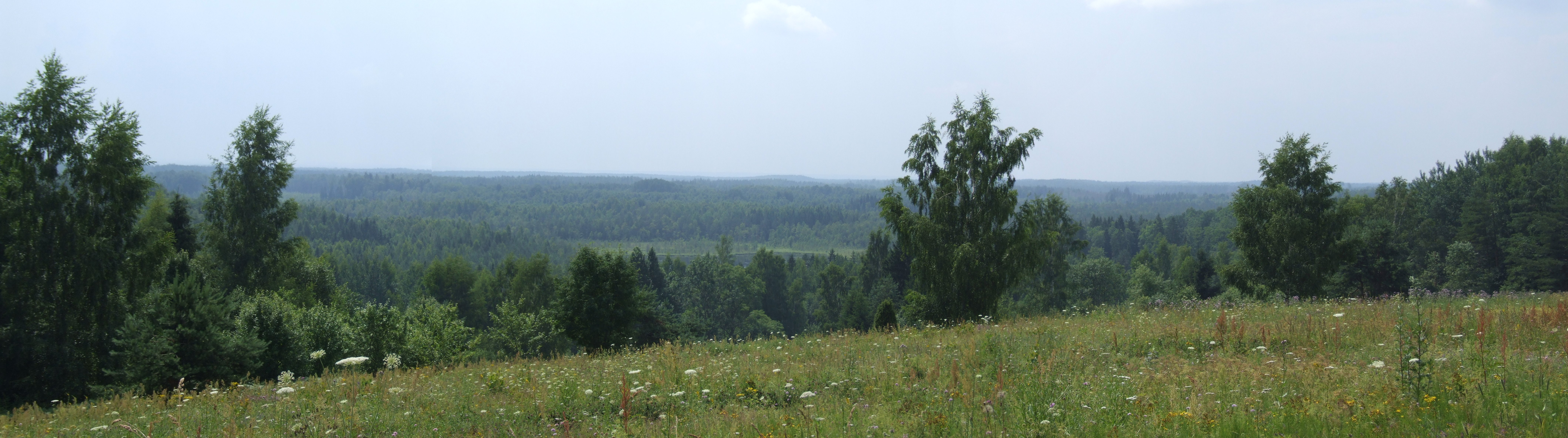 Panorāma no Numernes vaļņa, 09.07.2011.